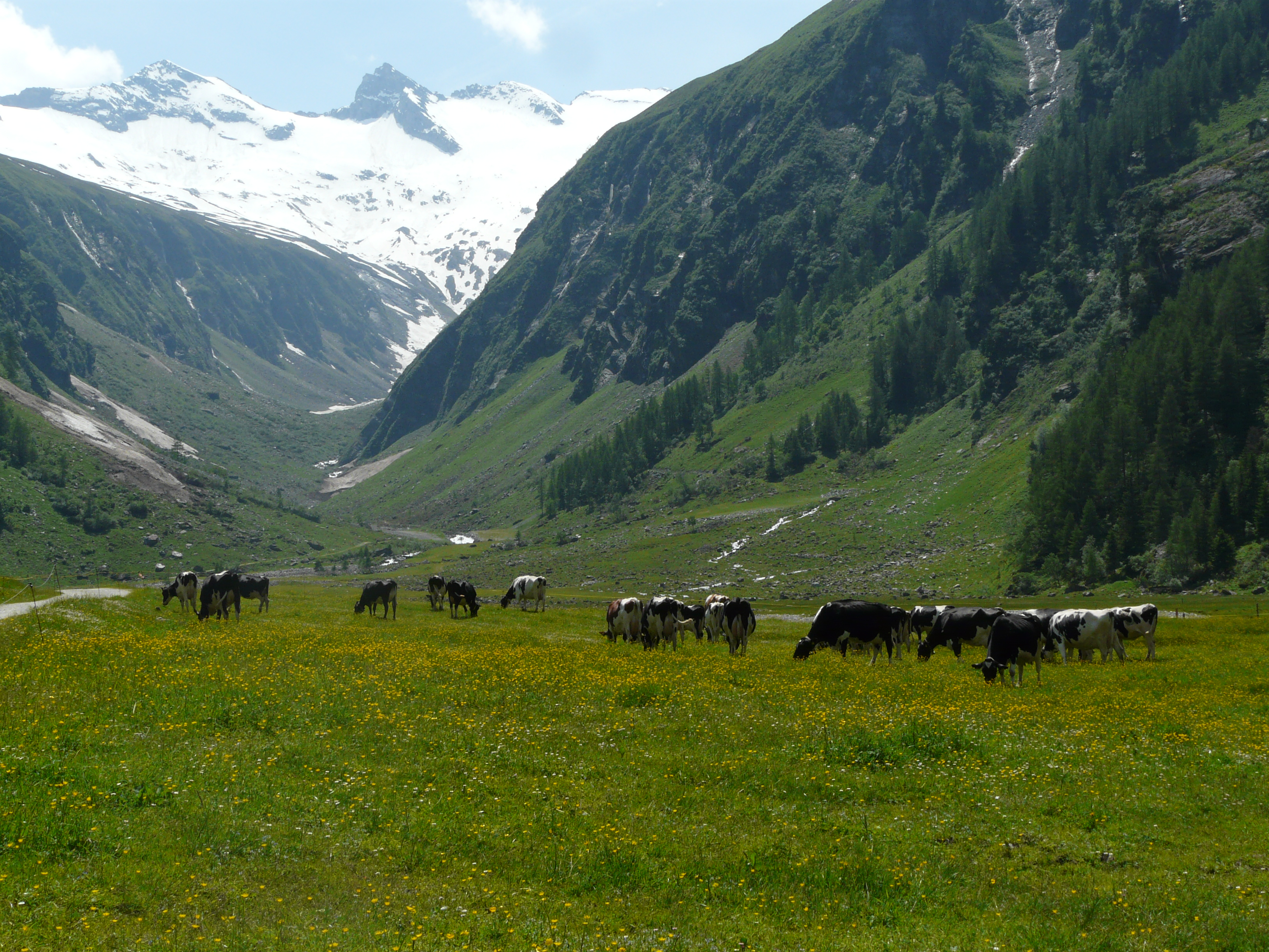 Blick von der Moa Alm ins hintere Habachtal